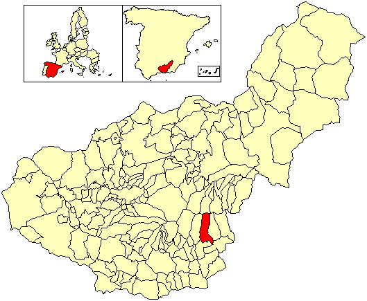 Situación del término municipal de Alpujarra de la Sierra respecto a la provincia de Granada, en España.